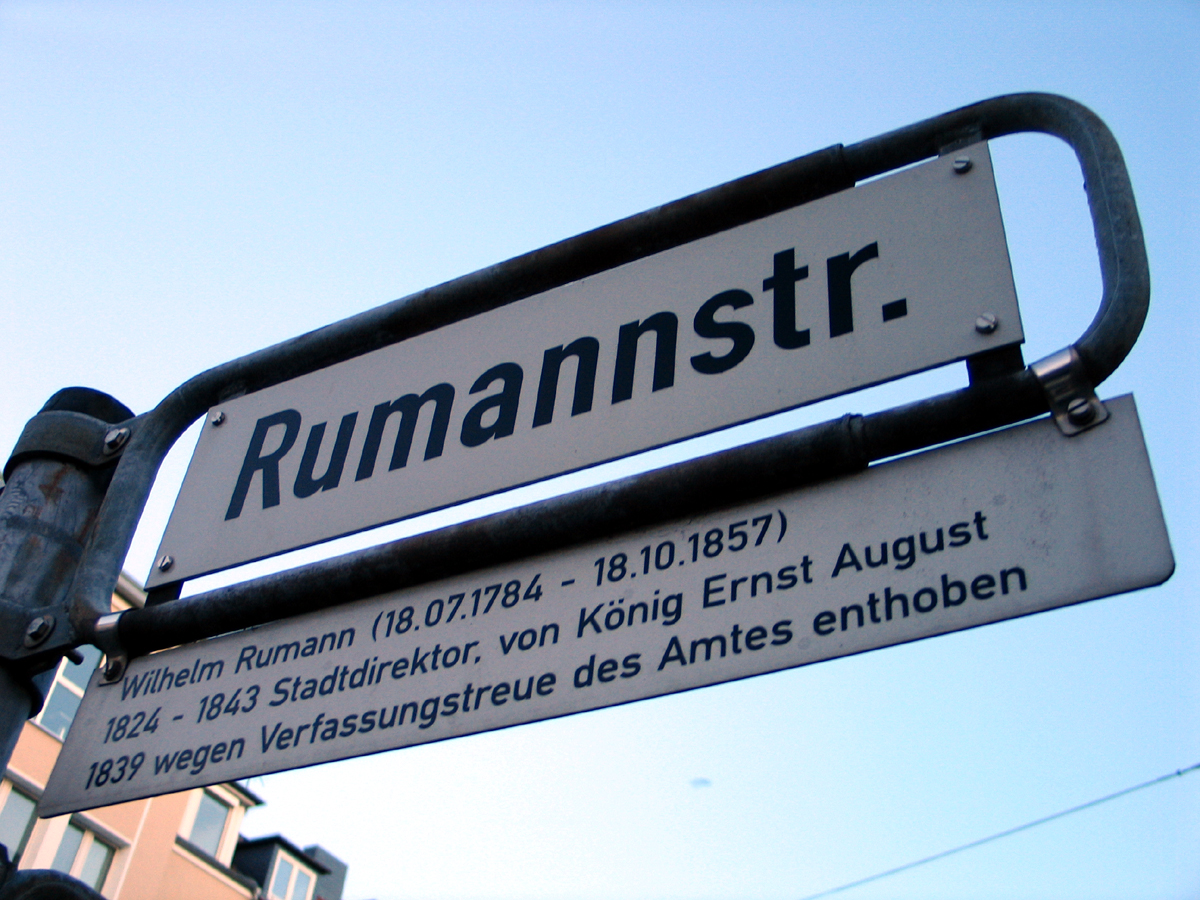 Die Legende unter dem Straßenschild der Rumannstraße Ecke Bödekerstraße erläutert: „Wilhelm Rumann (18.07.1784 - 18.10.1857), 1824 - 1843 Stadtdirektor, von König Ernst August 1839 wegen Verfassungstreue des Amtes enthoben“ ...